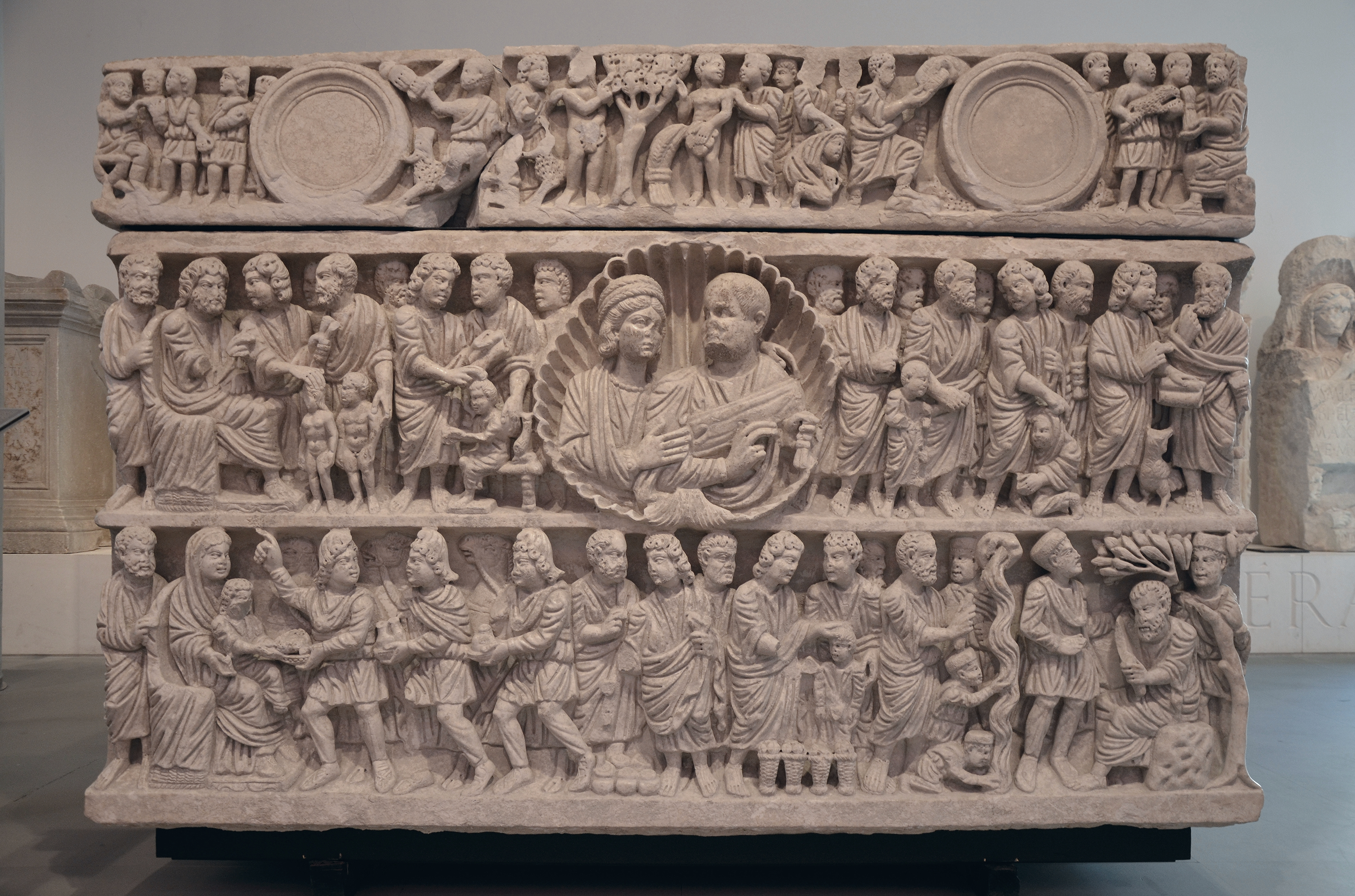 Musée de l'Arles antique, Arles, France